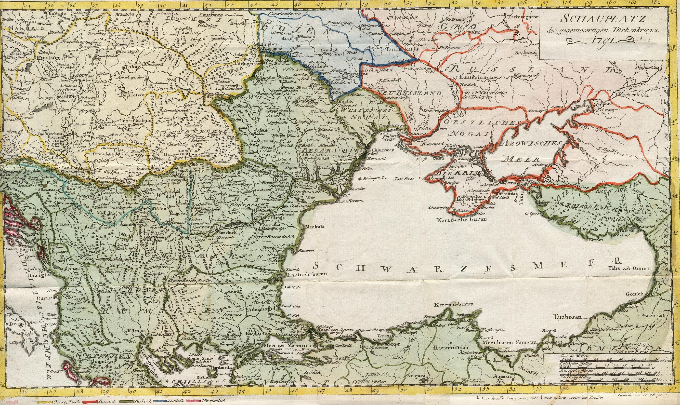 Karte. Balkan. Schwarzes Meer. Ottomannisches Reich.